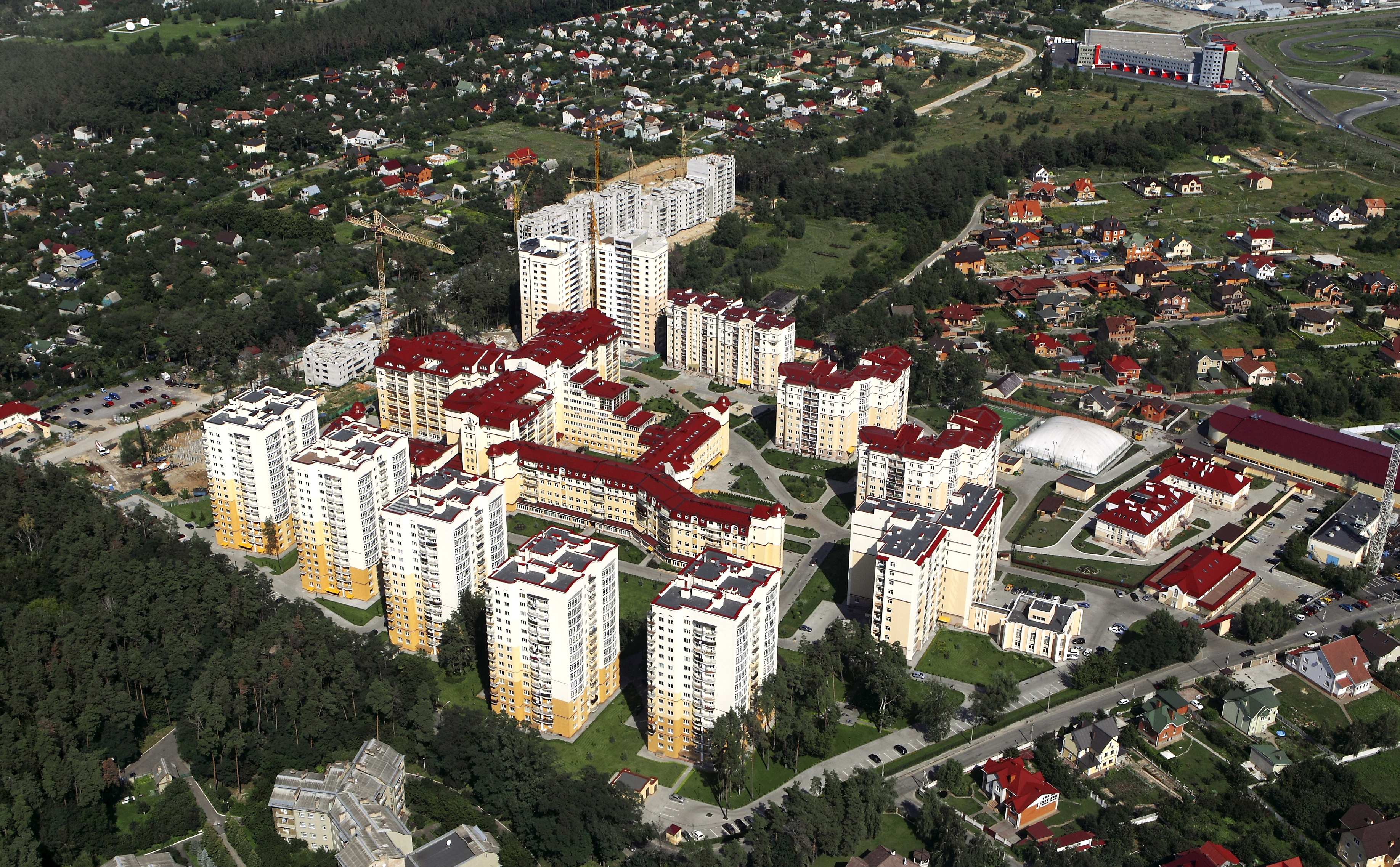 Аэрофото жилого комплекса "Чайки"